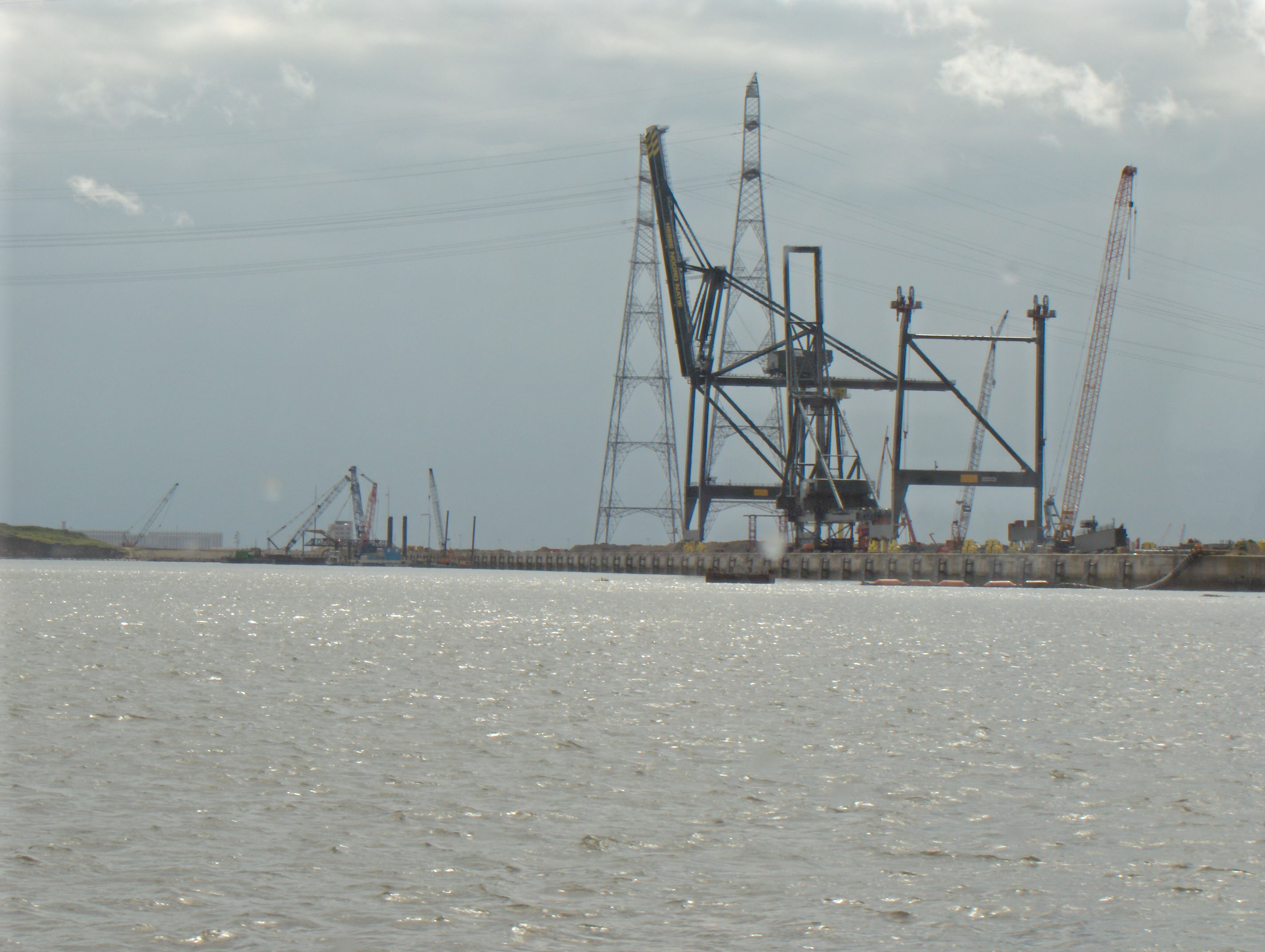 Bild: Deurganckdok, Hafen von Antwerpen (Waaslandhaven, Gemeinde Beveren), Anschluss mit der Schelde. Blick von der Schelde (Scheldefähre Doel - Lillo), südwestwärts. Fotograf: Friedrich Tellberg Datum: 7. August 2005